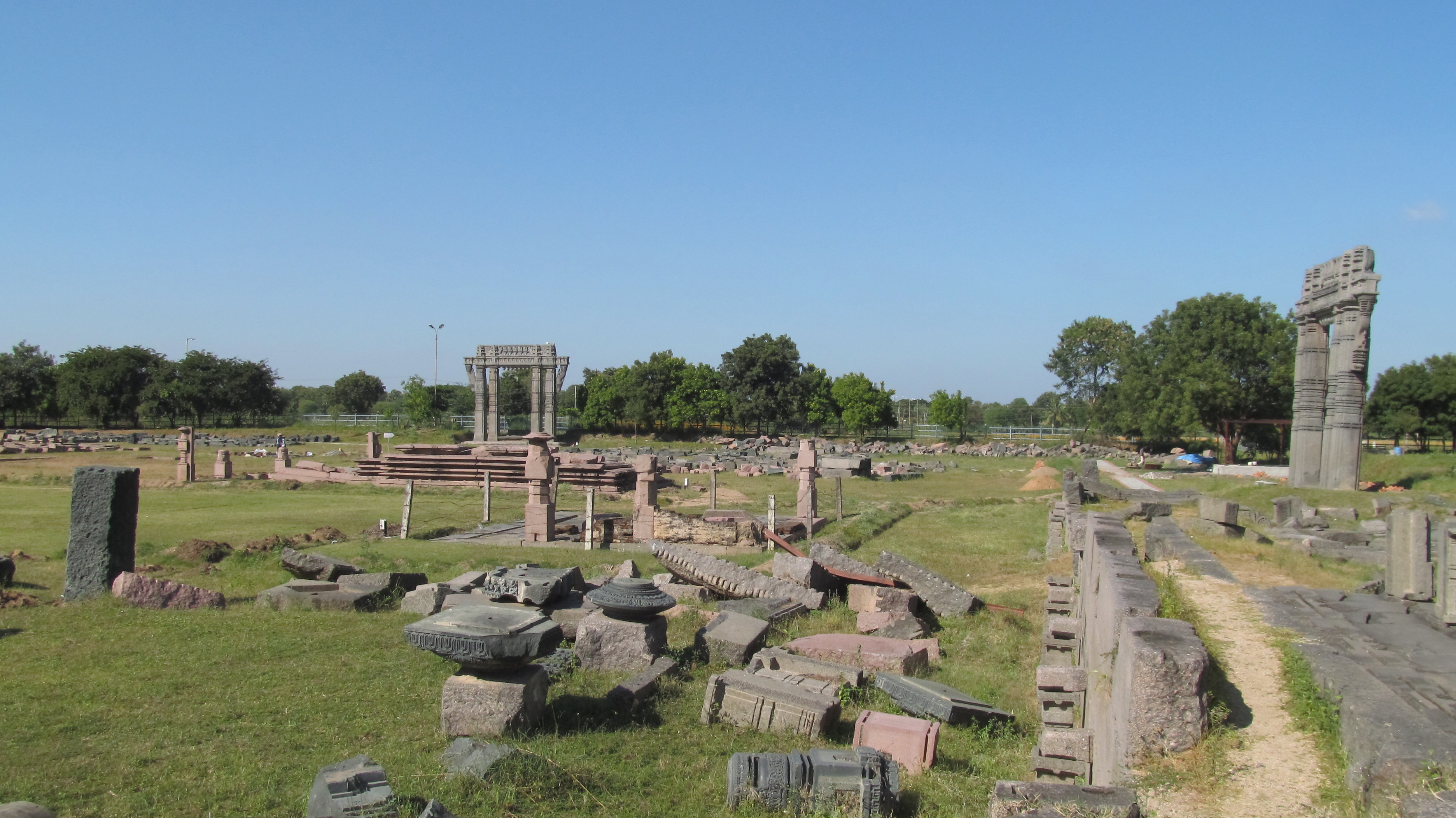 വാറങ്കല്‍